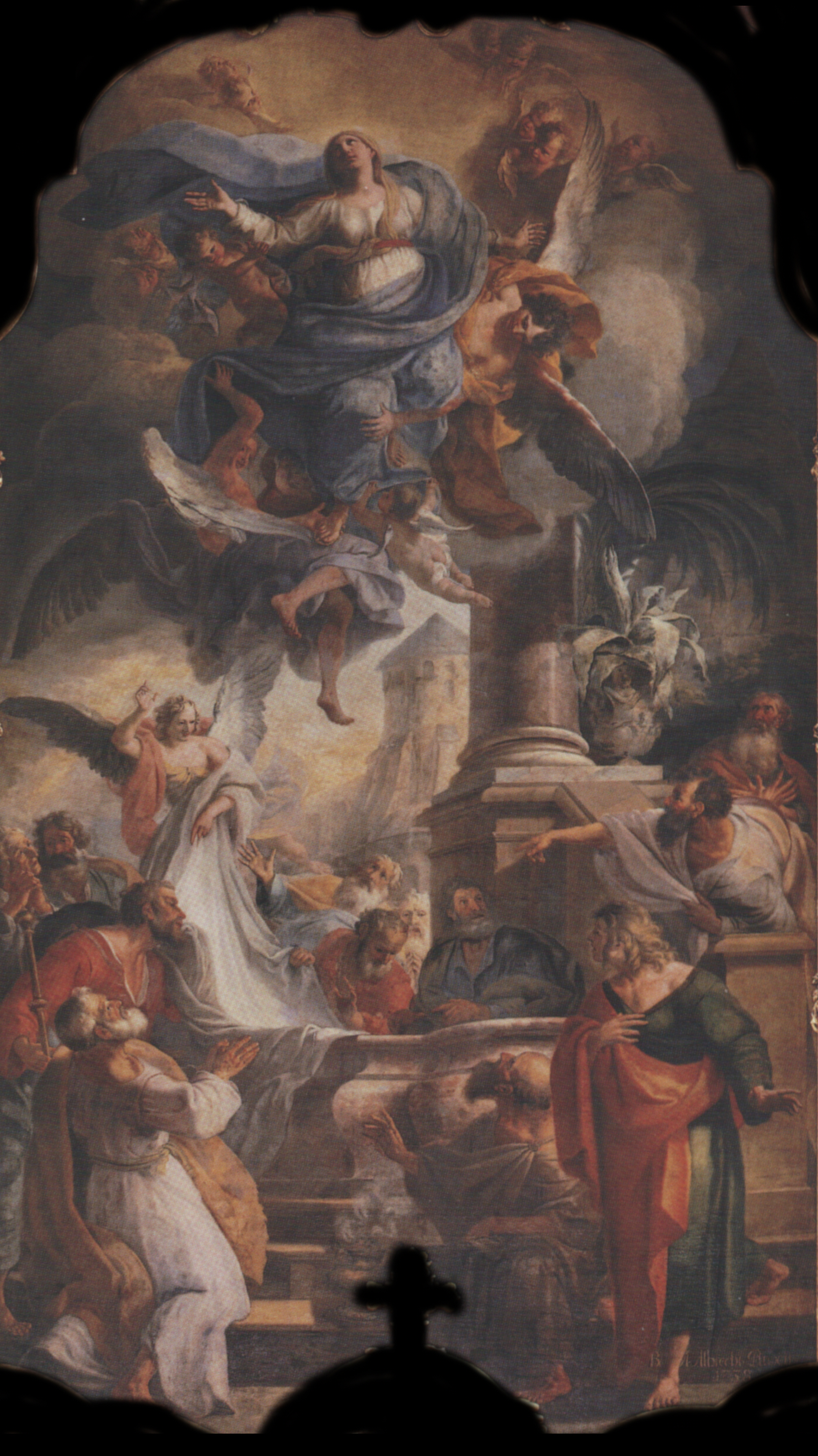 (versenkbares) Hochaltarblatt: Himmelfahrt Mariens